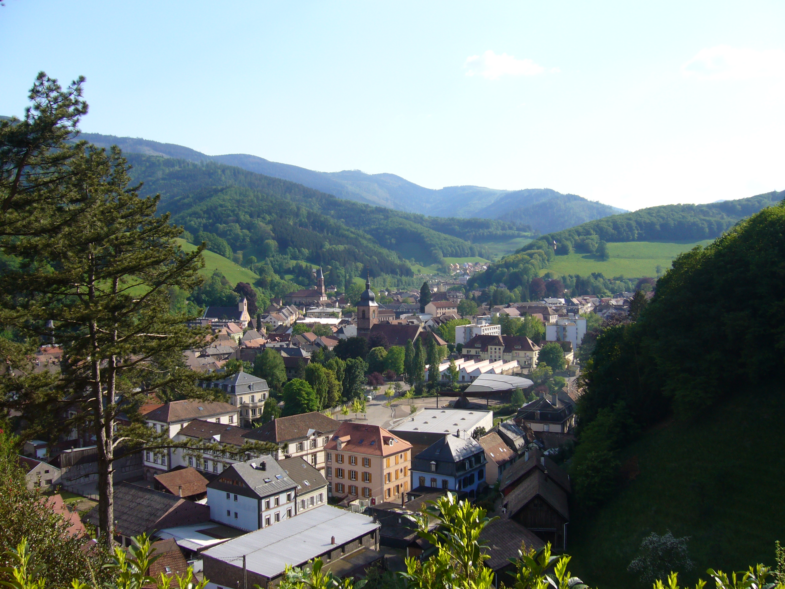 Sainte-Marie-aux-Mines: Vue sur Sainte-Marie-aux-Mines depuis la Croix de mission